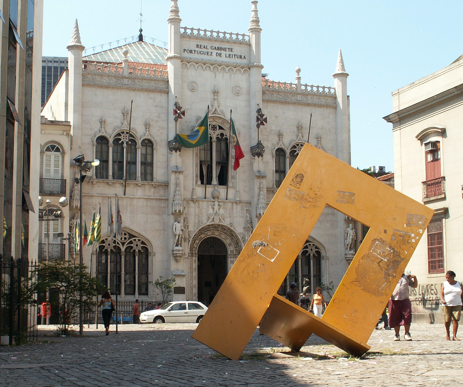 Façade of the Real Gabinete Português de Leitura in Rio de Janeiro, Brazil